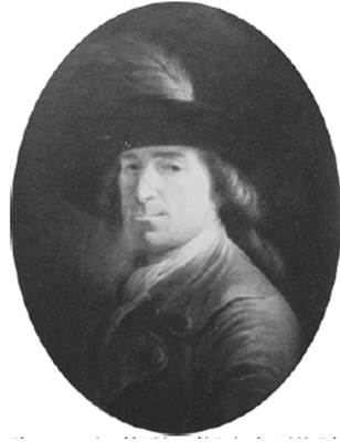 Self-portrait